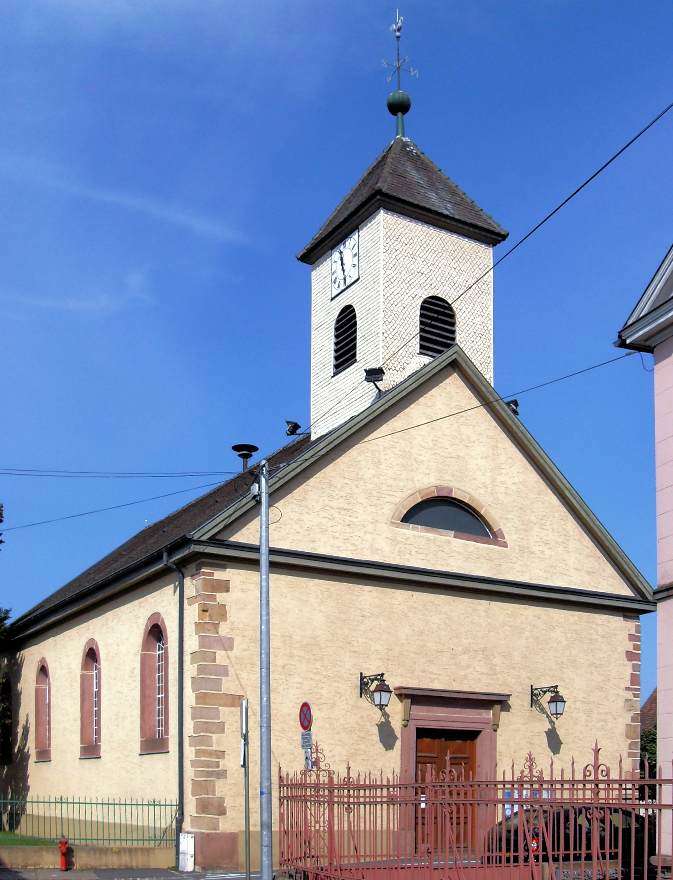 L'église Saint-Joseph à Sundhoffen